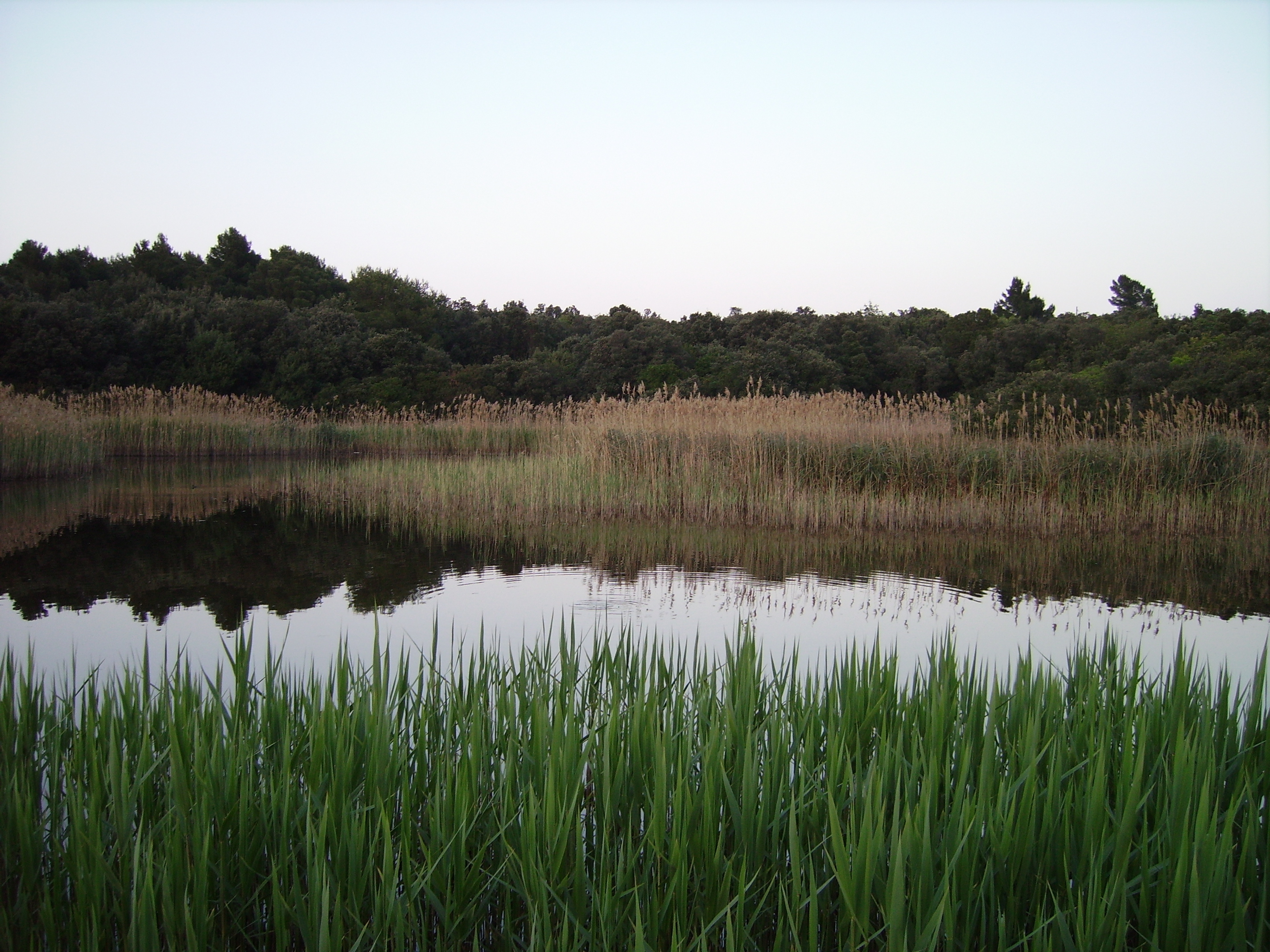 I laghetti di Portonovo di Ancona.